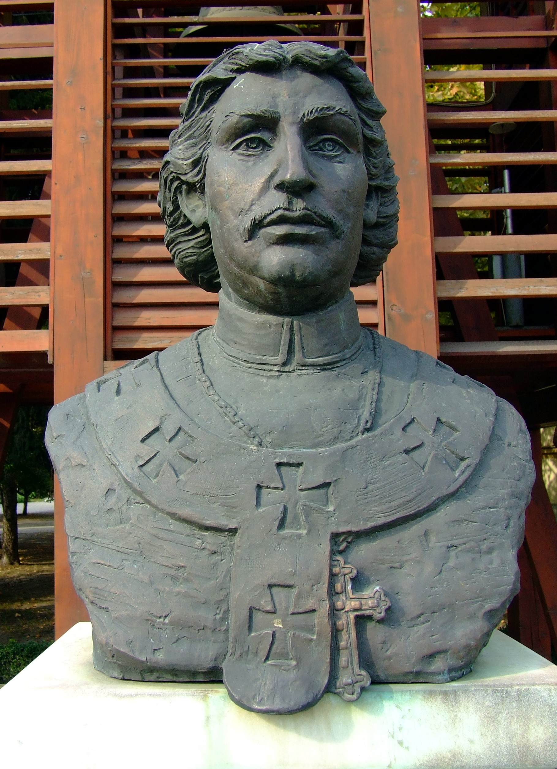 Patachich Gábor kalocsai érsek (1733–1745) szobra Kecelen. Lebó Ferenc alkotása (1997)